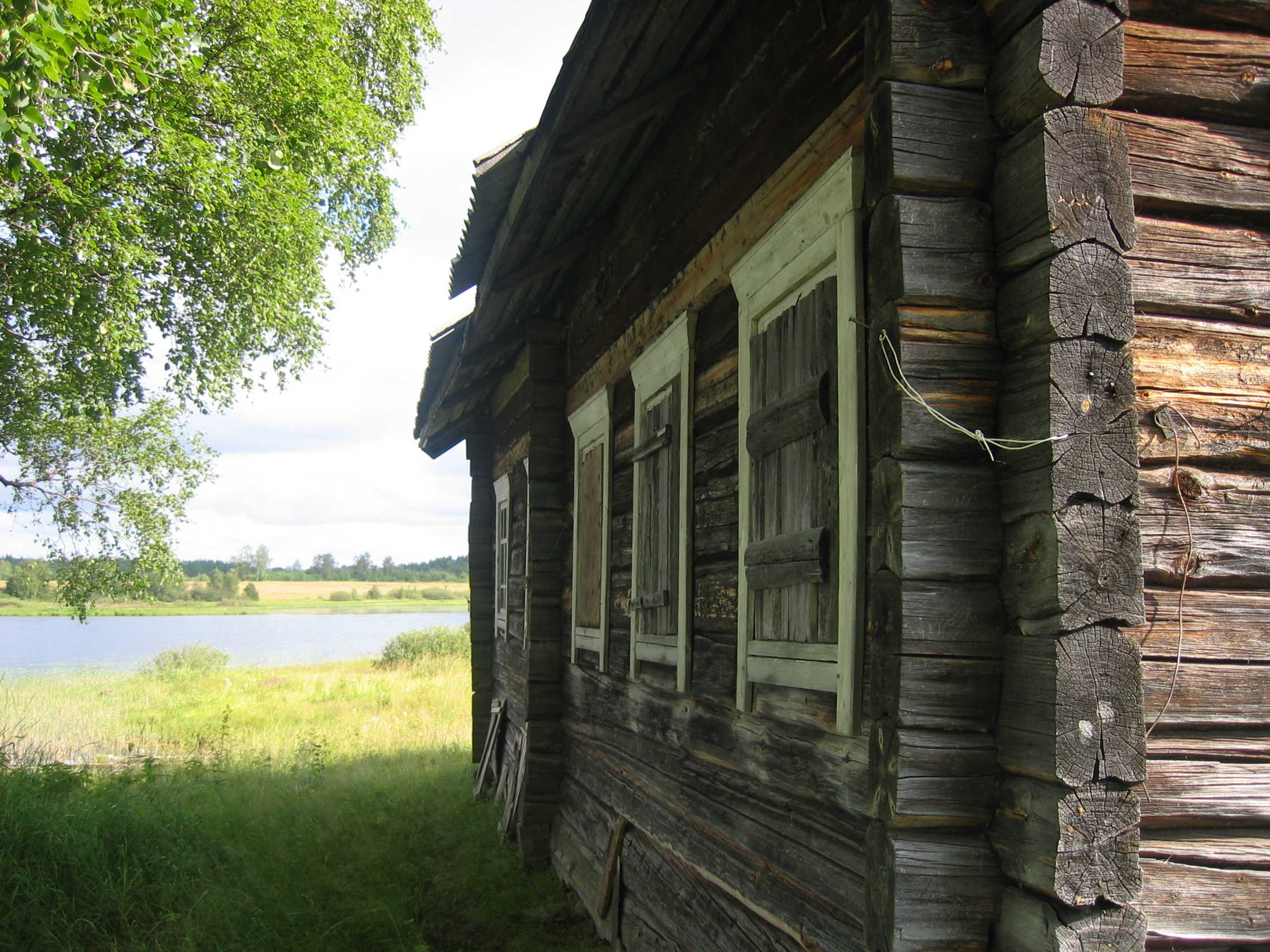 Talo Hukkalantermällä Tollonjoella, Vuokkiniemi, 2007